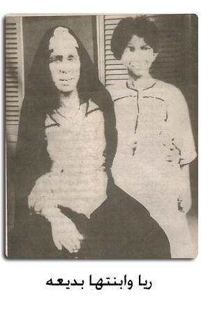 ריא והבת של בדיעה